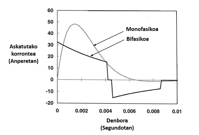 Irudiko grafikoan desfibriladore monofasiko eta bifasikoen grafikoa ageri da.